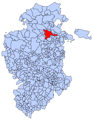 Oña en Burgos